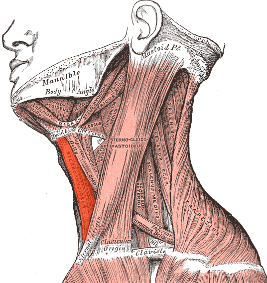 Sternohyoideus muscle